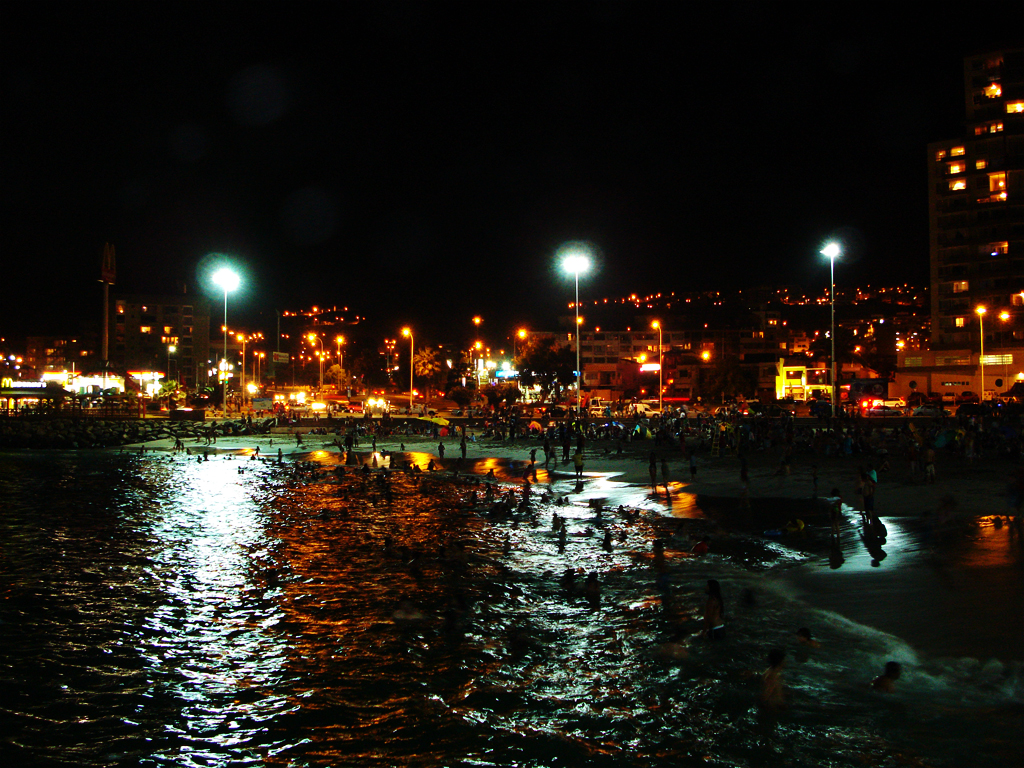 Gente bañandose a medianoche (00:40) en Balneario Municipal de Antofagasta (Chile)